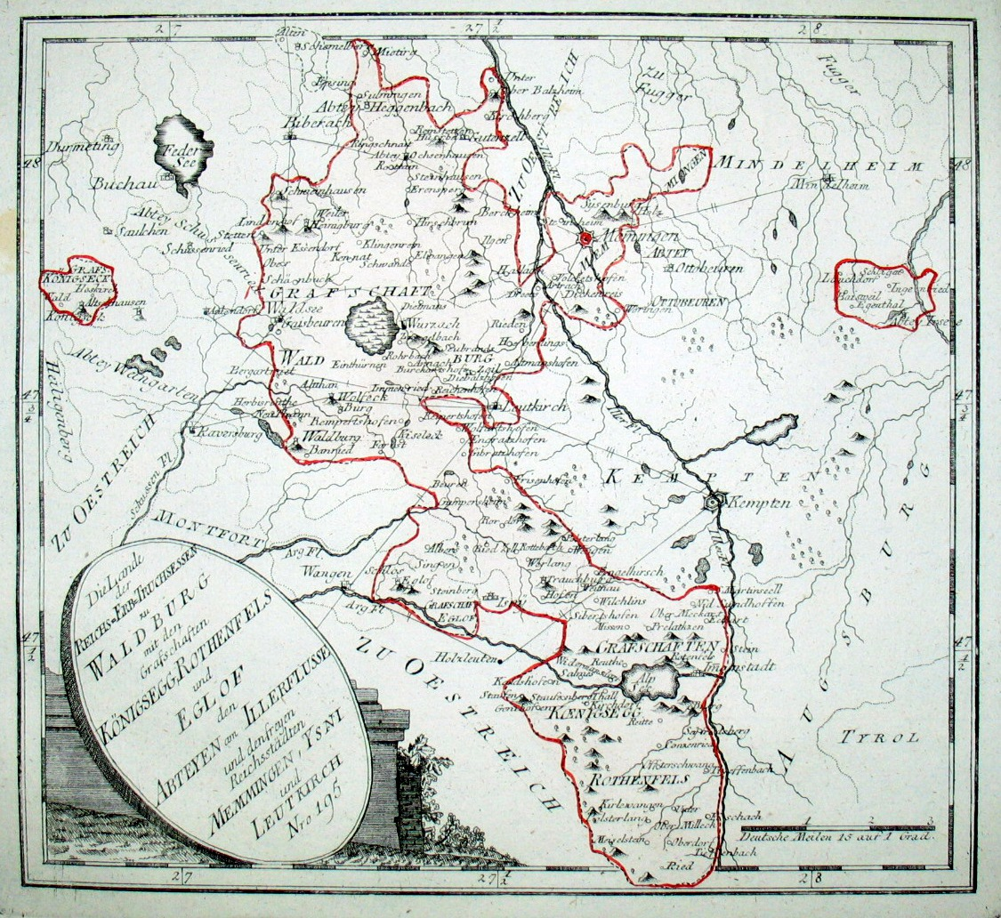 Die Lande der Reichs-Erb-Truchsessen zu Waldburg mit den Grafschaften Königsegg, Rothenfels und Eglof den Abteyen am Illerflusse und den freyen Reichsstädten Memmingen, Ysni und Leutkirch. Nro. 195. Kolorierter Kupferstich